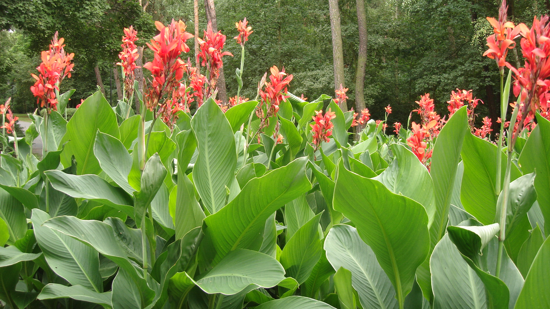 Rabaty w parku miejskim w Toruniu